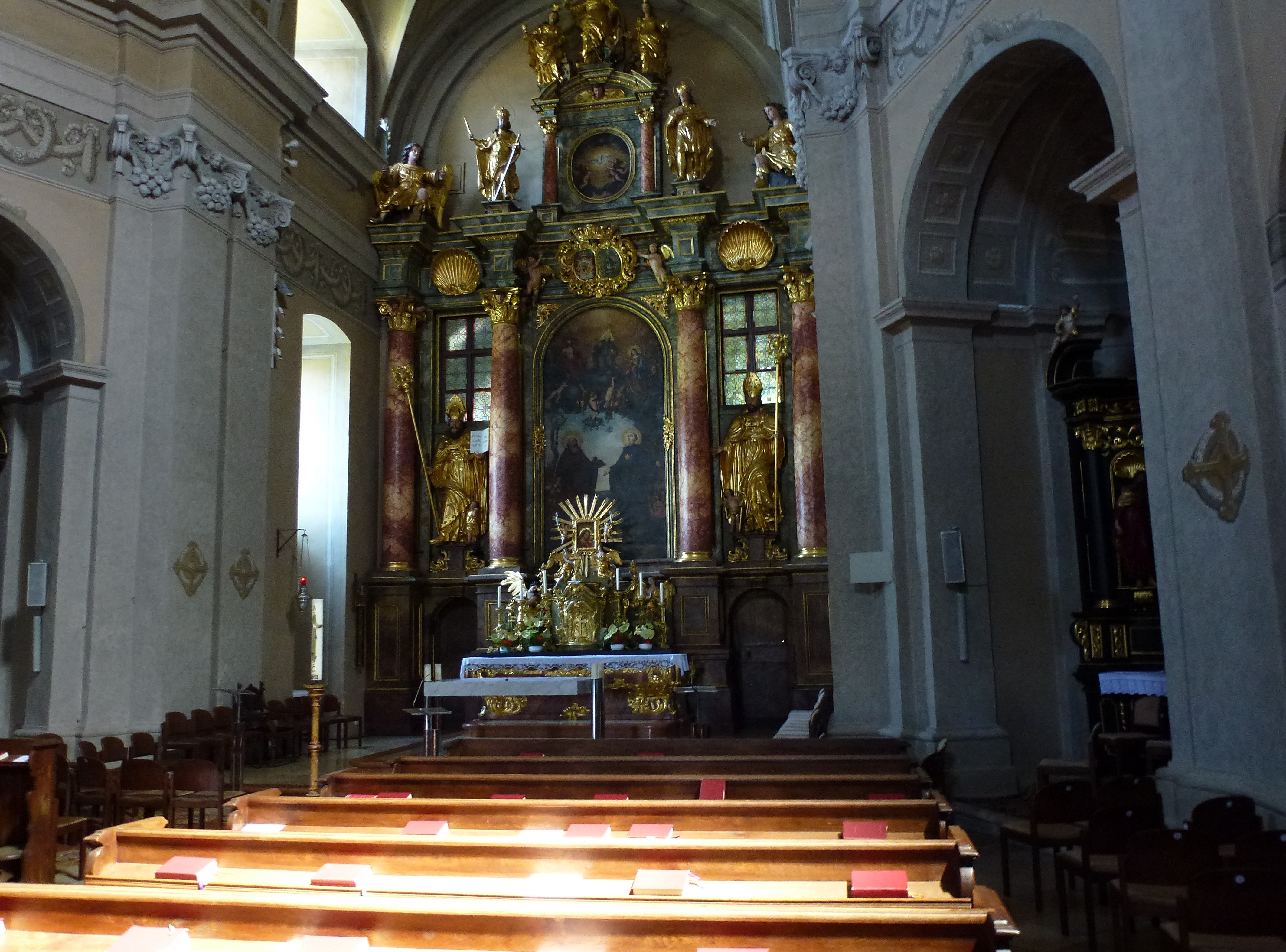 Wallfahrtskirche hl. Nikolaus in Lockenhaus